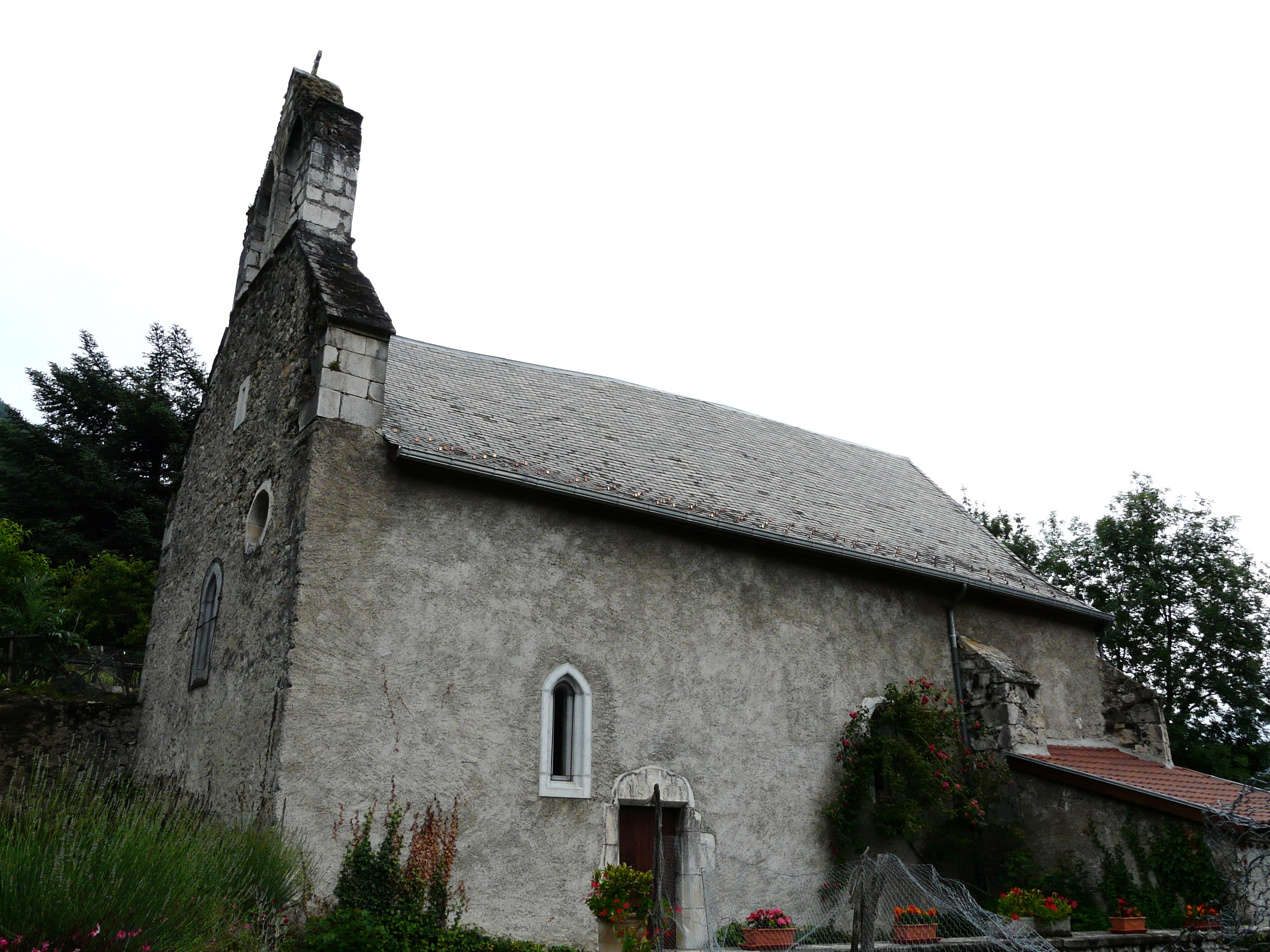 Le côté sud de la chapelle Notre-Dame-des-Vignes, Sainte Marie, Bagiry, Haute-Garonne, France.